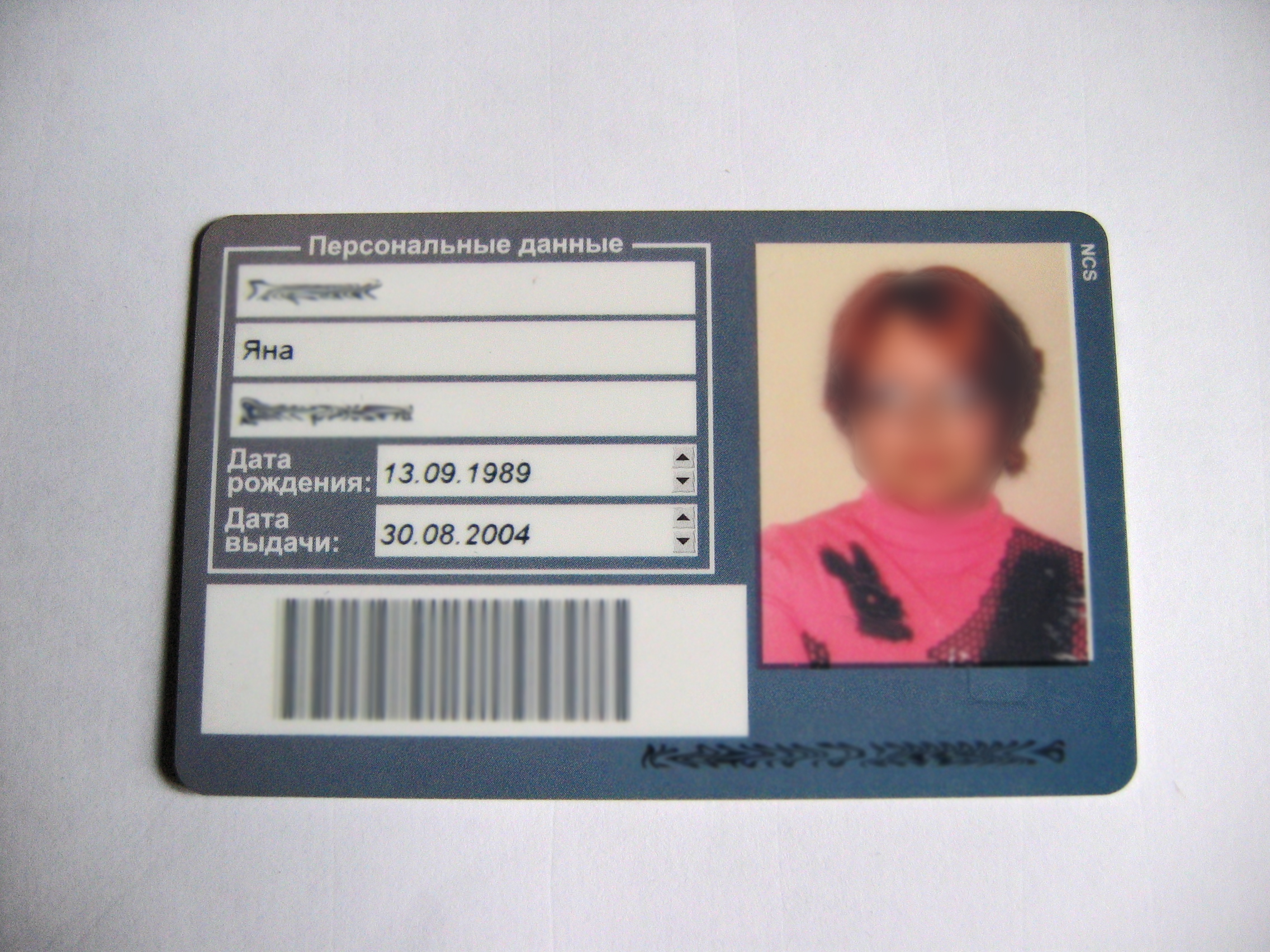 Смарт-карта для проезда в Петербургском Метрополитене, на ней я плохо получилась, поэтому заинкогнитила лицо:)